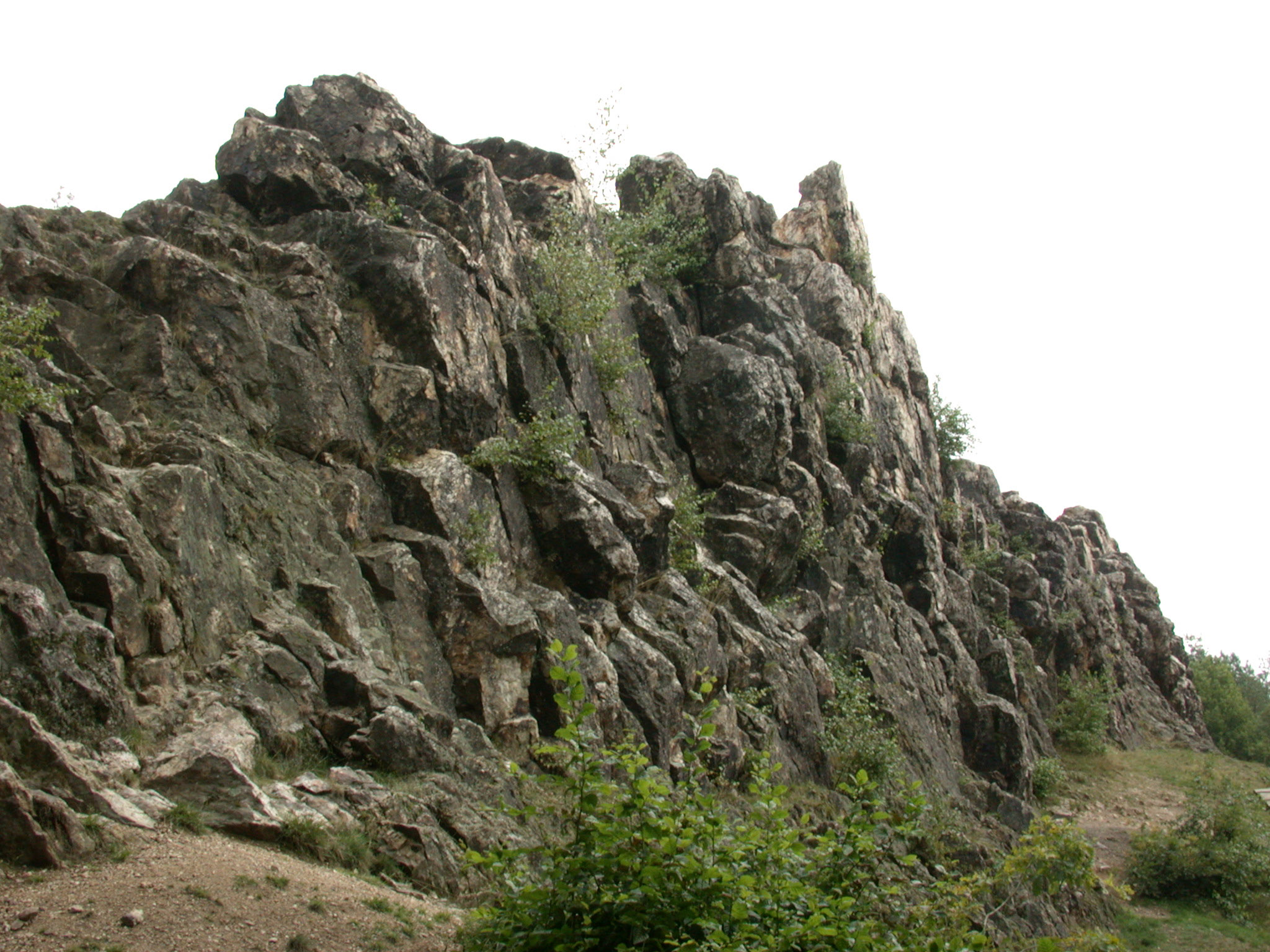 Eschbarcher Klippen, Usingen-Eschbach, Deutschland